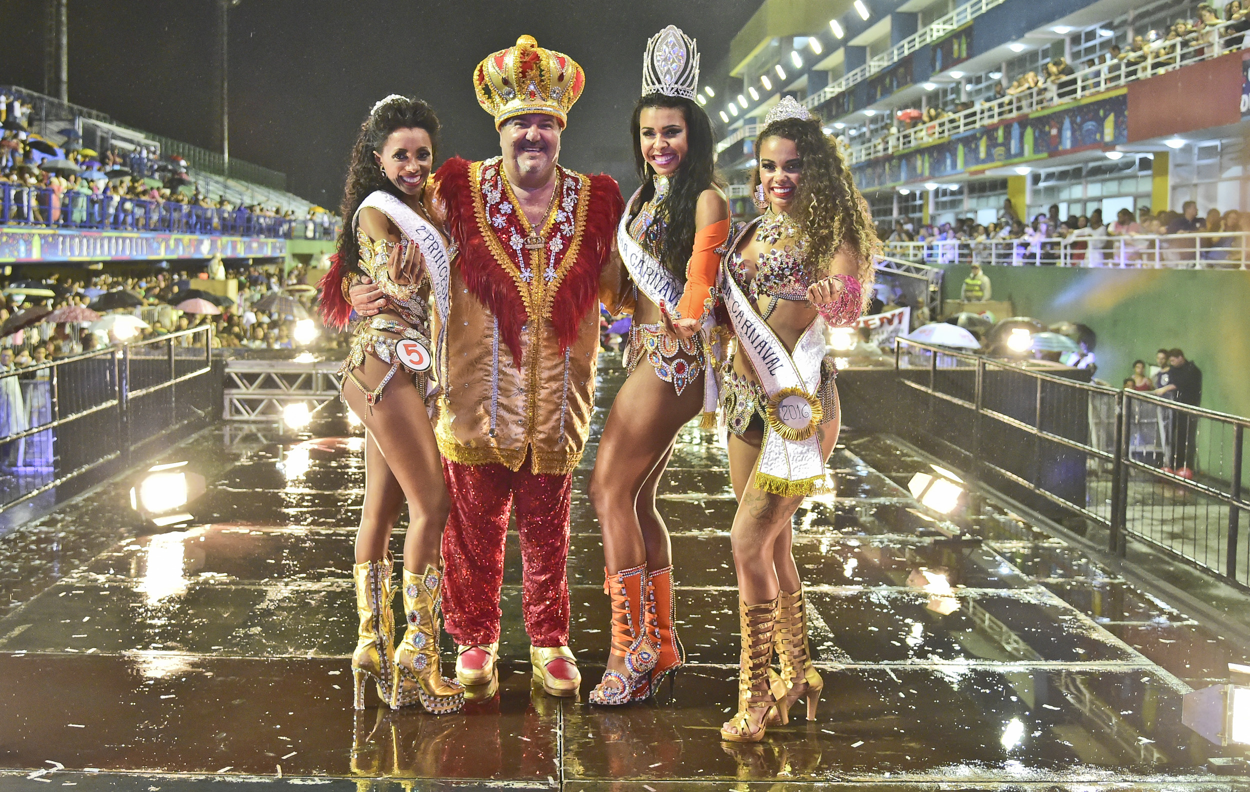 Corte eleita do Carnaval de Florianópolis de 2016, formada pela rainha Chayeni Bittencourt, pela primeira princesa Karoline Junckes e pela segunda princesa Gisele Breigeron, além do rei Momo vitálicio, Hernani Hulk.